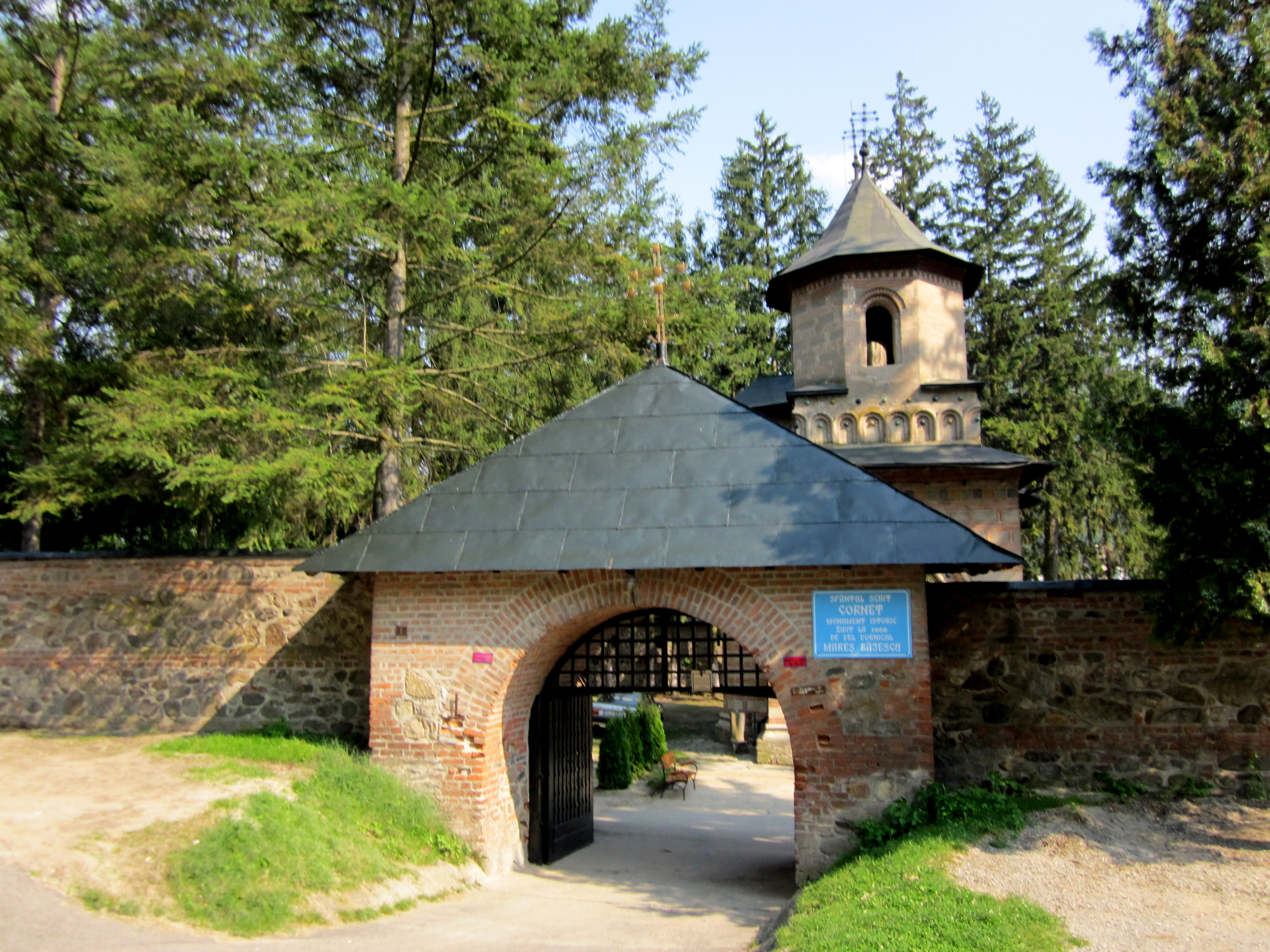 IMG 0900 Schitul Cornet VL-II-a-A-09947 04